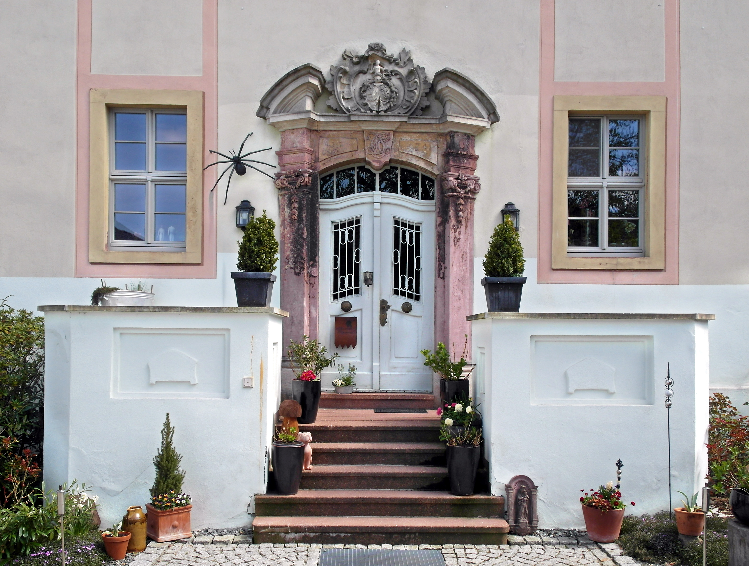 24.04.2017 09243 Mittelfrohna (Niederfrohna) Obere Hauptstraße 1: Rittergut Mittelfrohna (GMP: 50.879100,12.744841). Das Herrenhaus wurde 1772-1774 für Johann Christoph und Johann Gottlieb Siegert erbaut, worauf im Portalschlußstein die Buchstaben JCGS und die Jahreszahl 1774 hinweisen. Heute Wohnhaus in Privatbesitz. [SAM9475.JPG]20170424210DR.JPG(c)Blobelt